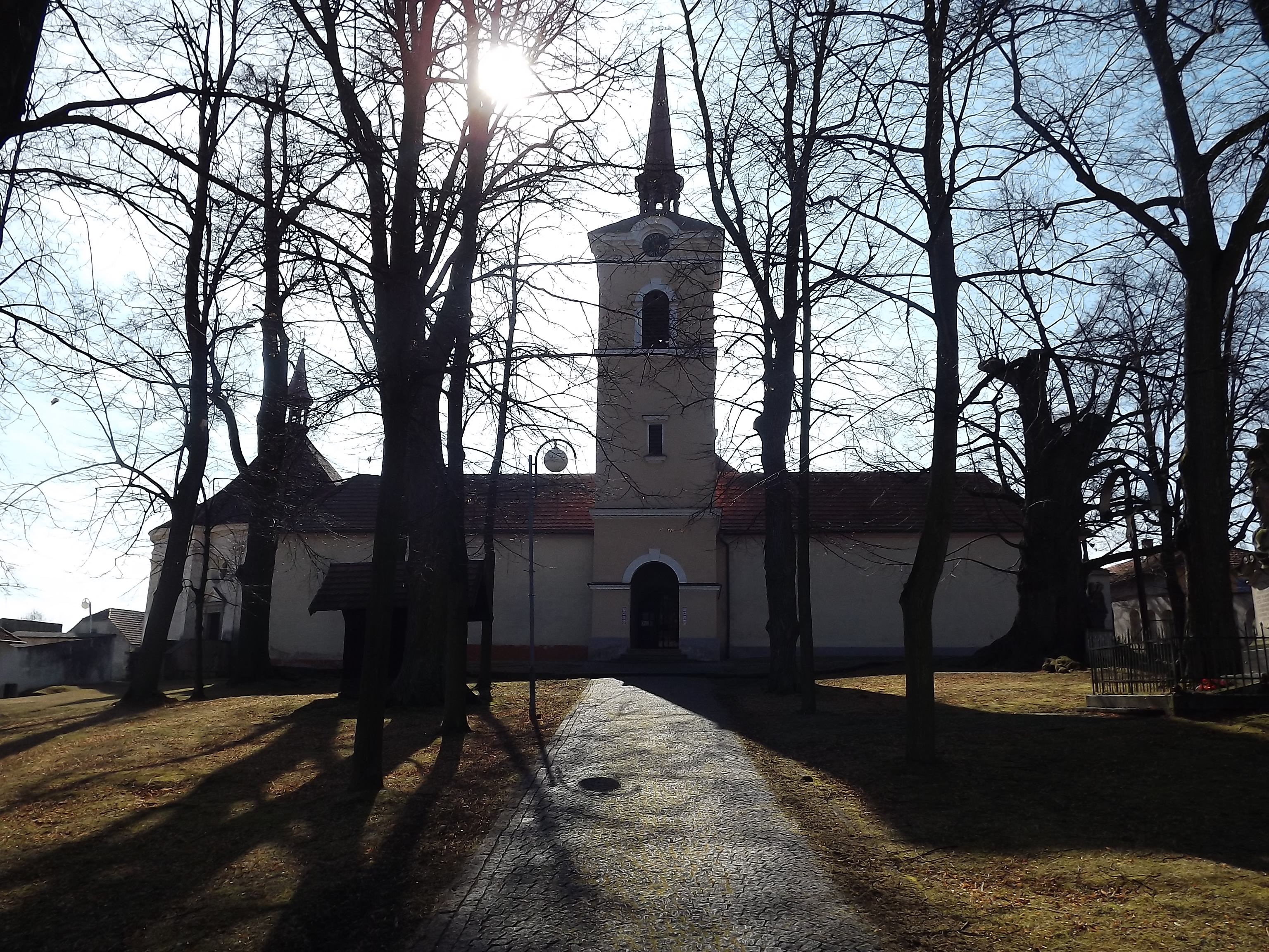 Kostel sv. Ducha a Loretánská kaple Sancta Casa (Římov), Dolní Římov, Římov